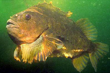 Cyclopterus lumpus, lumpsucker, lumpfish